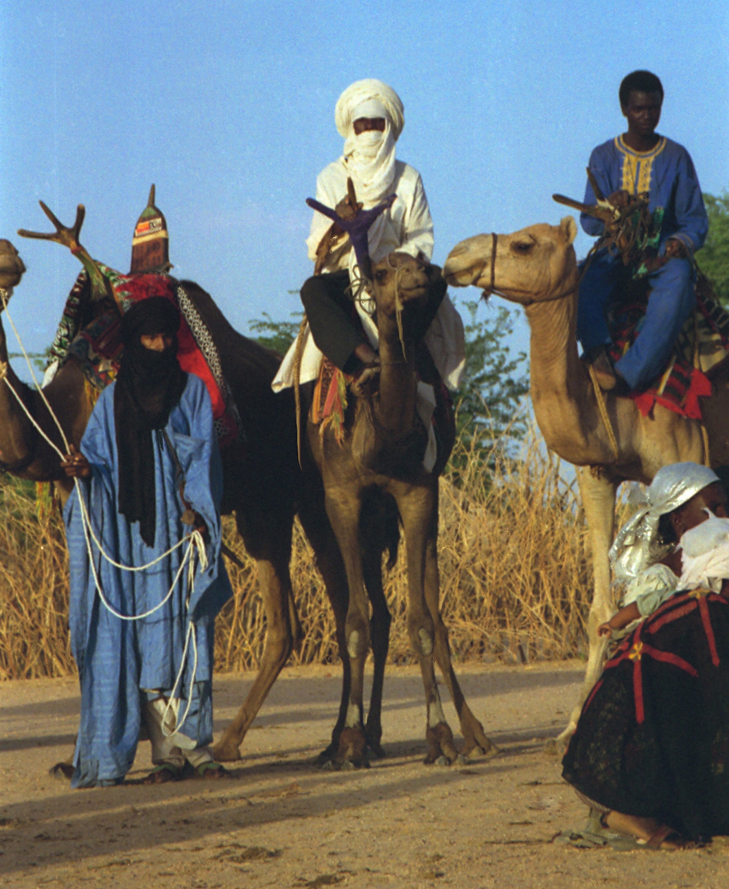 Tuareg men. Niger 1997.1997 #277-31A Tuareg